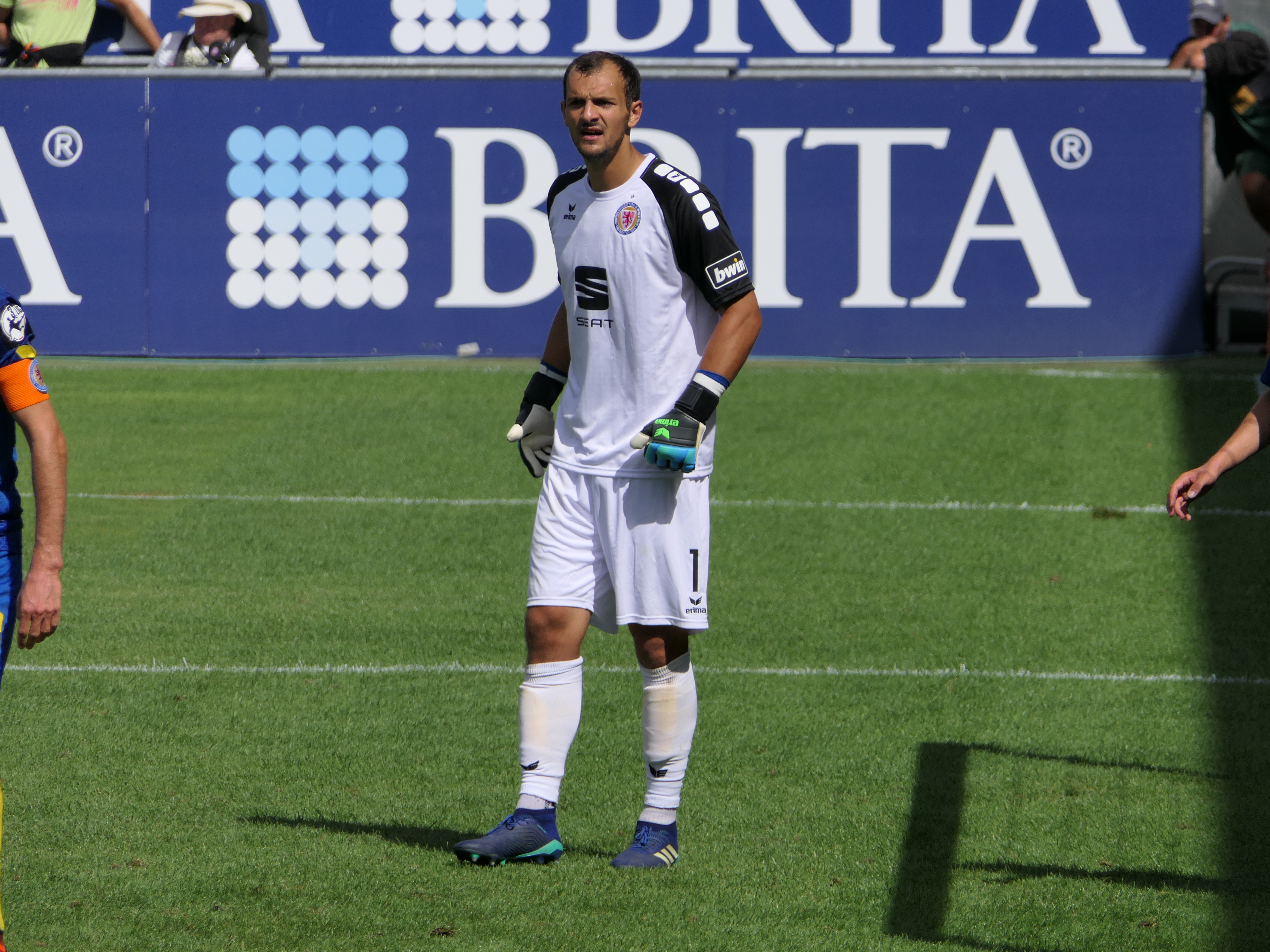 Der Fussballprofi Marcel Engelhardt im Trikot von Eintracht Braunschweig beim Auswärtsspiel beim SV Wehen Wiesbaden am 11.08.2018.